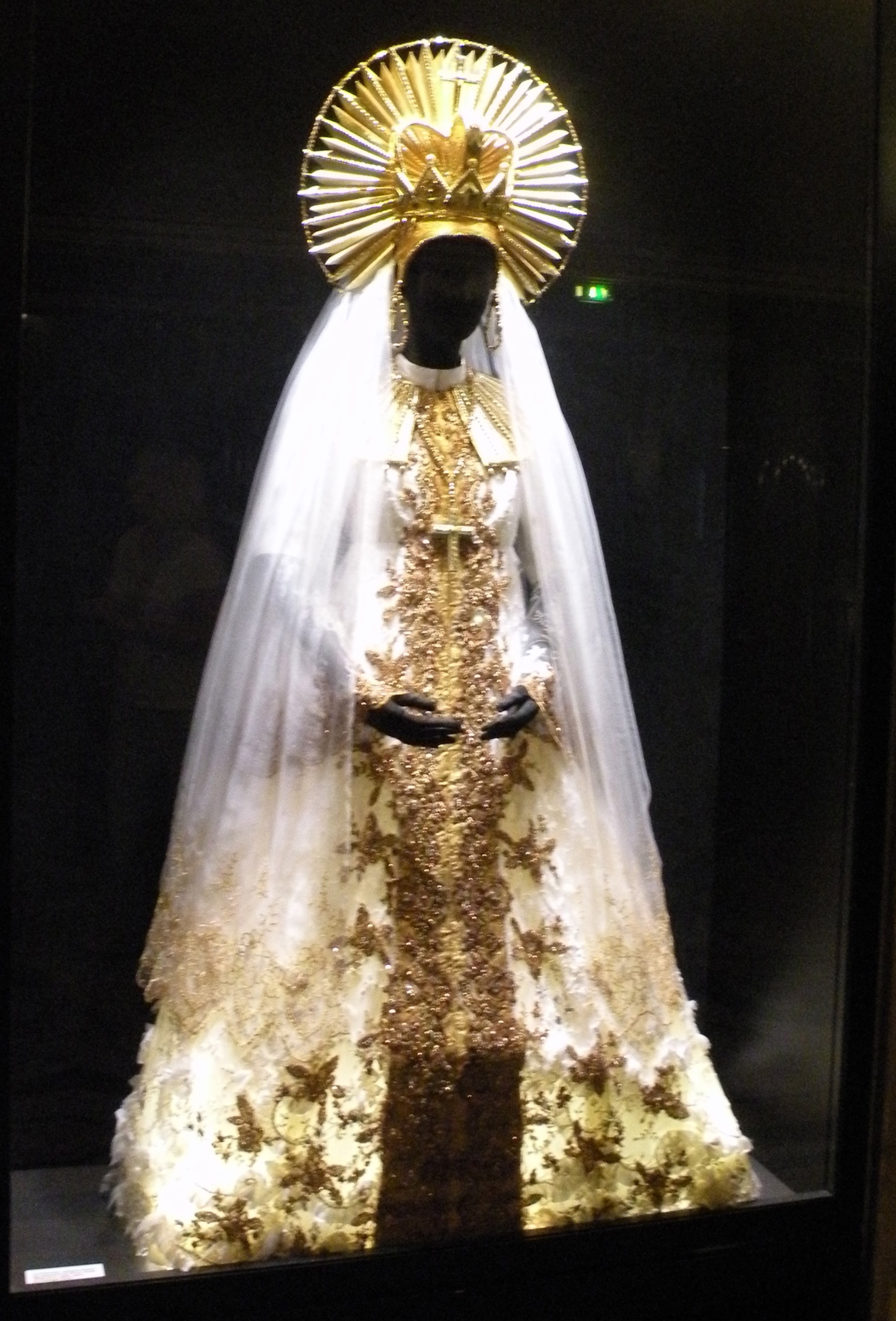 opéra garnier collection de costume